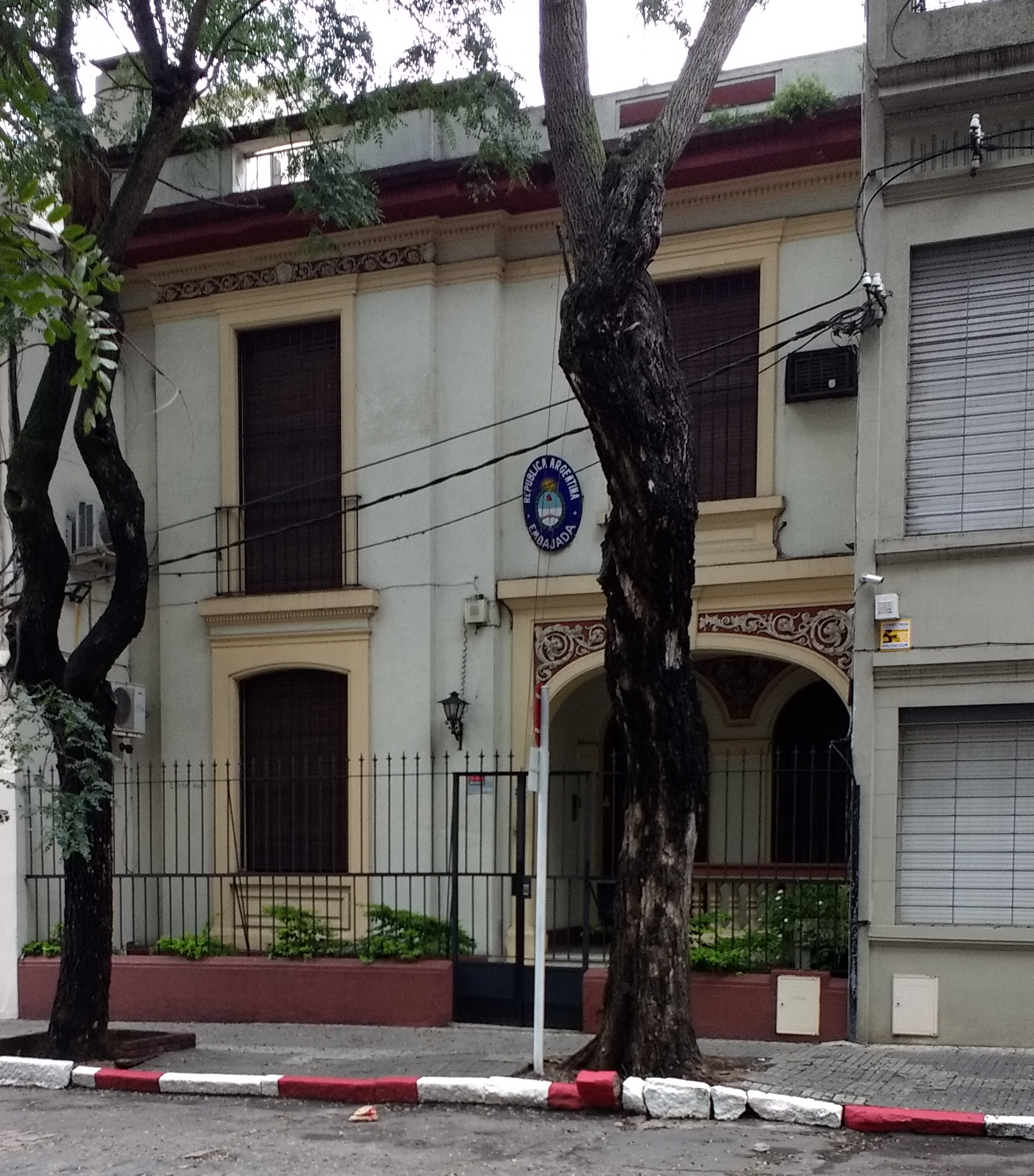 Embajada argentina en Montevideo.